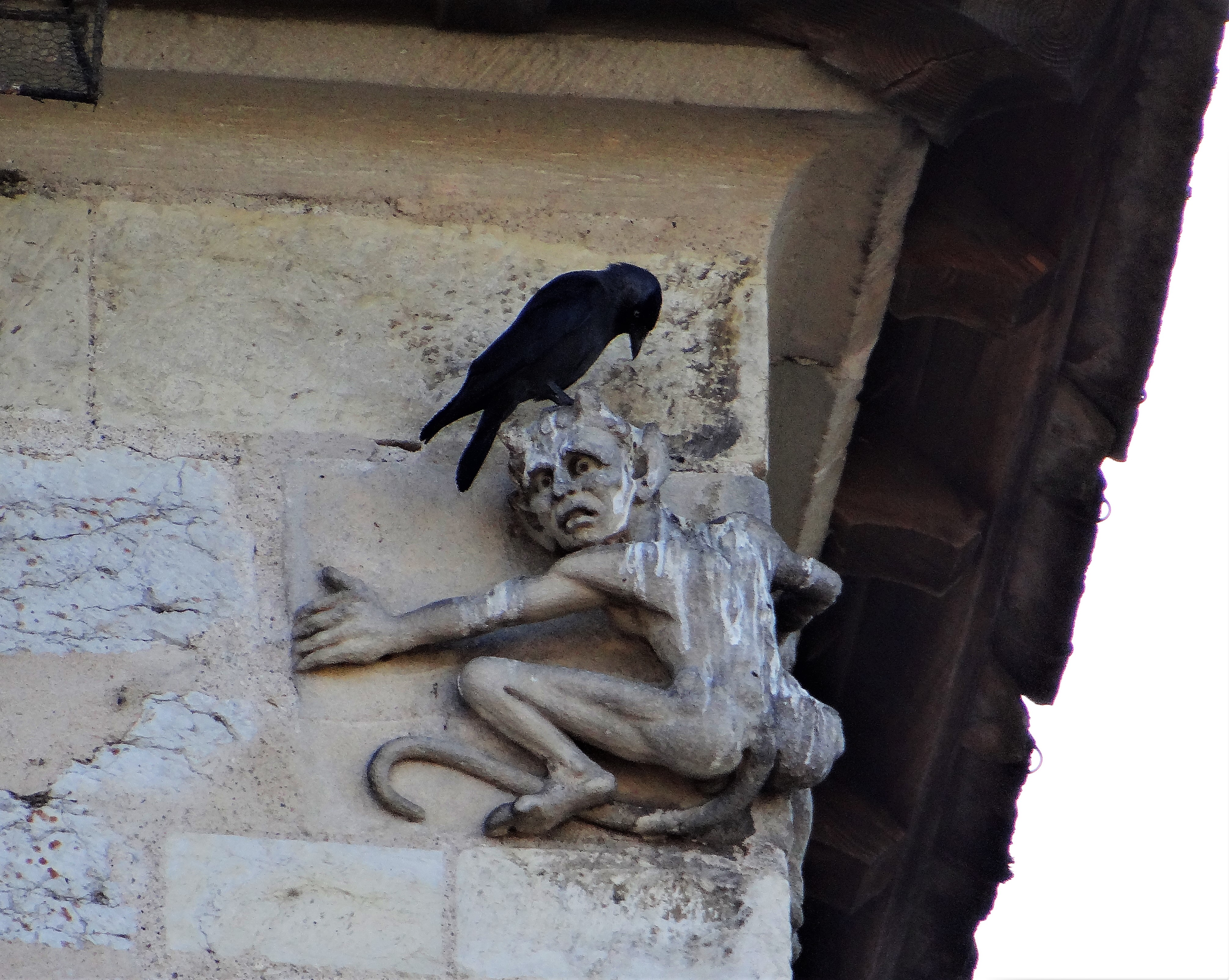 Cahors - Pont Valentré - Tour située au milieu du pont - Le diable essayant de desceller la dernière pierre du pont, sous la surveillance d'un corbeau